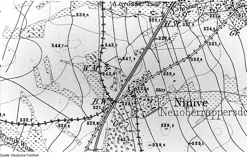 Original image description from the Deutsche FotothekHerrnhut-Ruppersdorf/O.L.-Ninive. Meßtischblatt, Sekt. Oderwitz, 1883